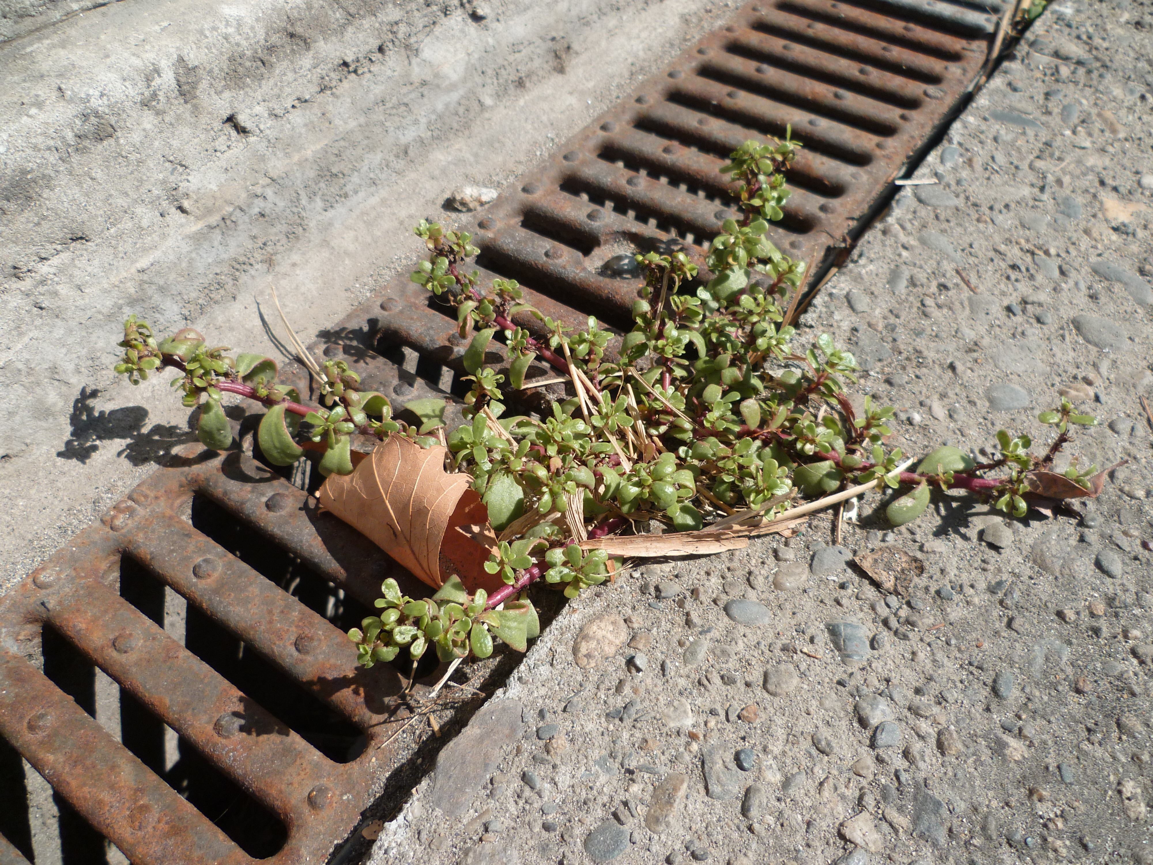 Portulaca oleracea sur le pont d'Ancely à Toulouse.